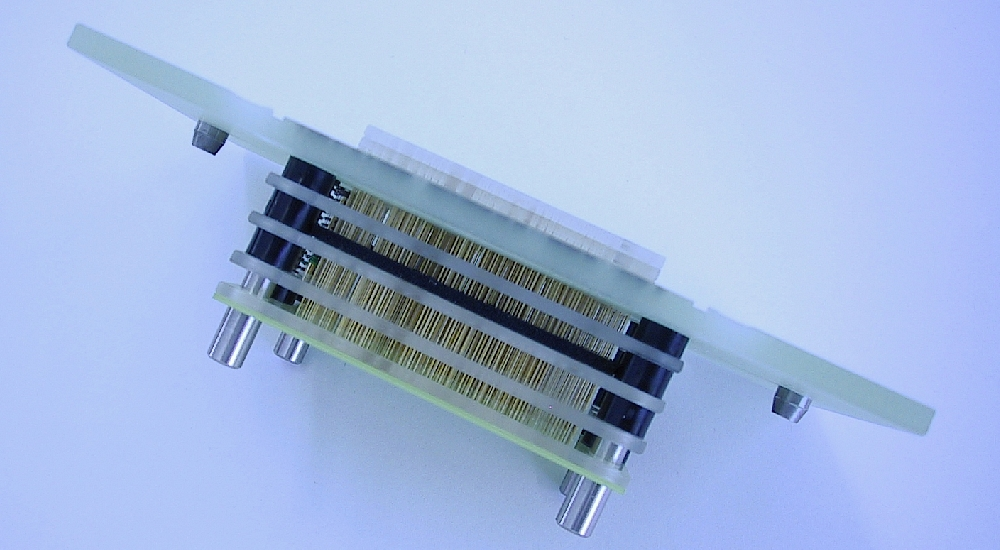 Starrnadeladapter für PCB Test mit ca. 800 Testpunkten